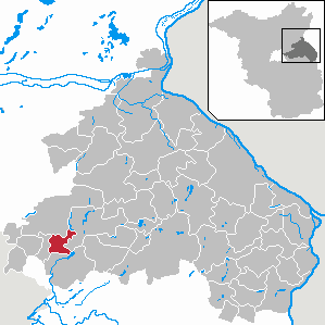 Petershagen/Eggersdorf in Brandenburg (Country) - District Märkisch-Oderland